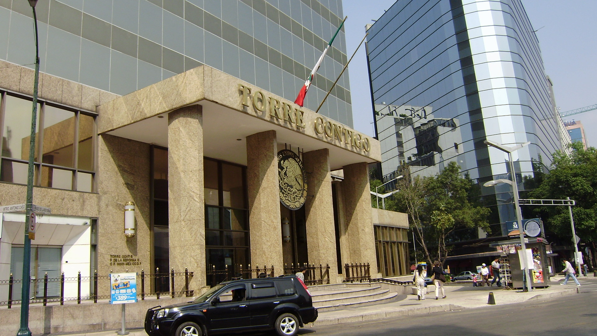 Torre Contigo en la Ciudad de México.